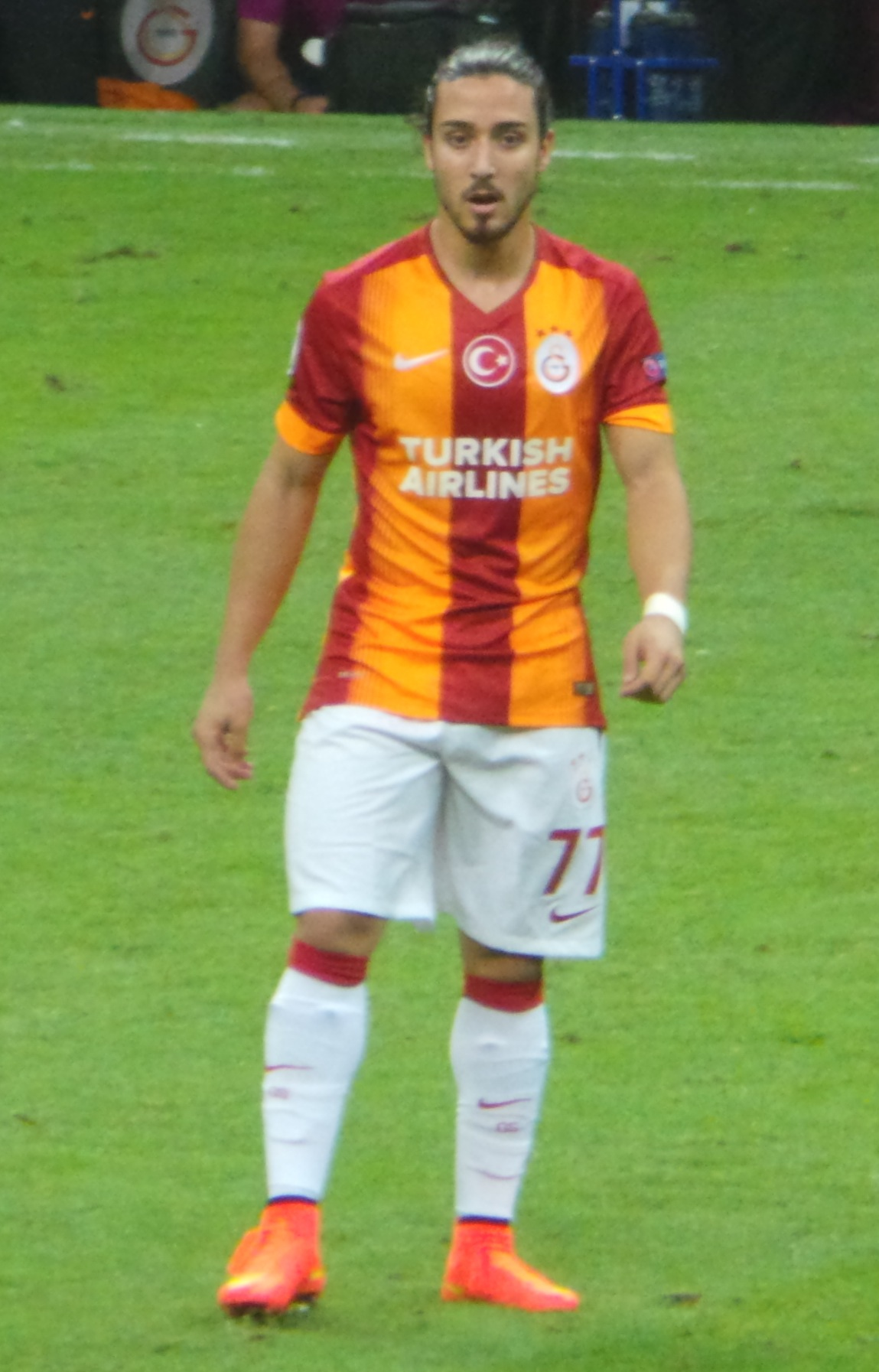 Tarık Çamdal ilk Şampiyonlar Ligi maçında